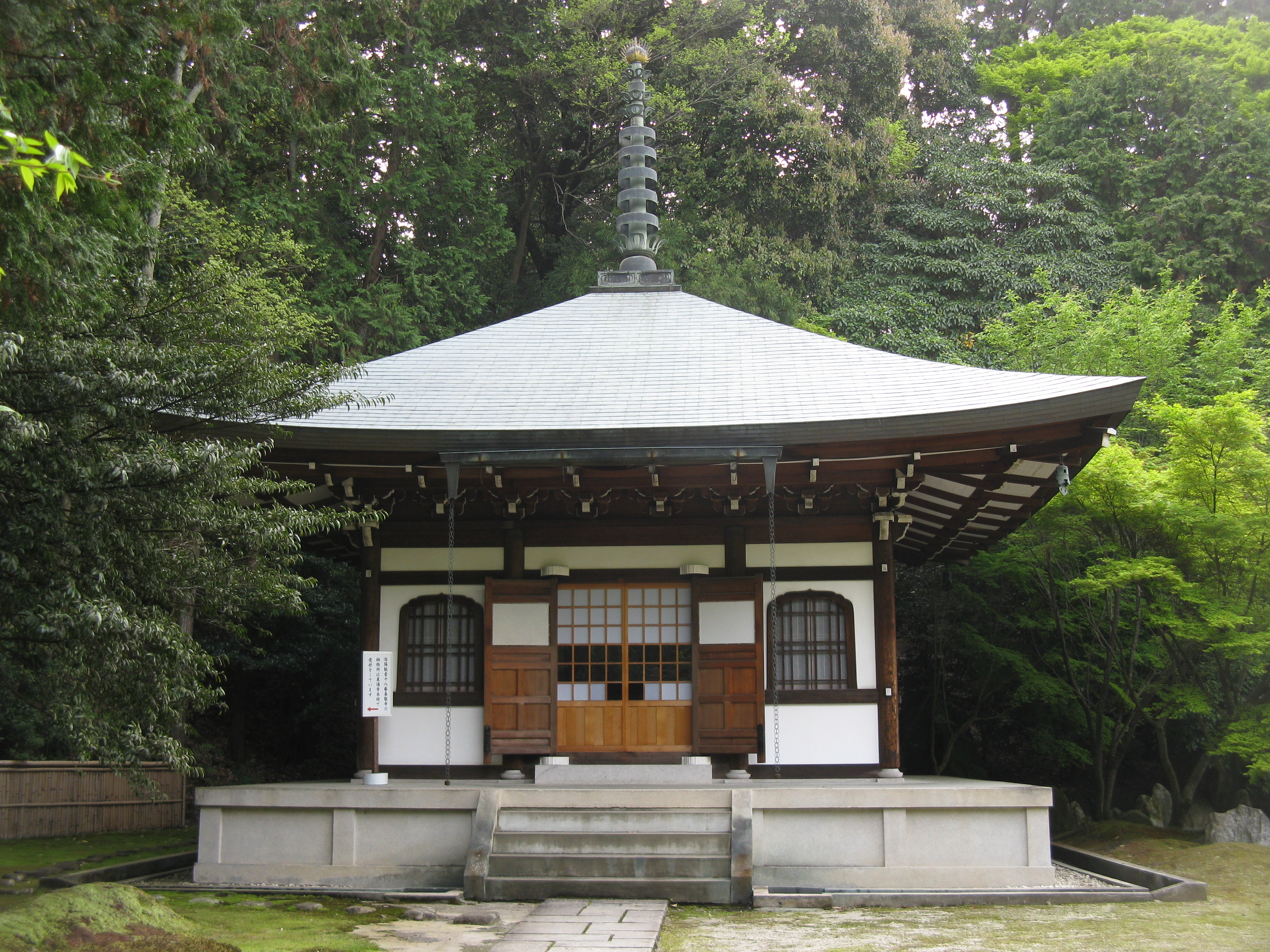 善能寺